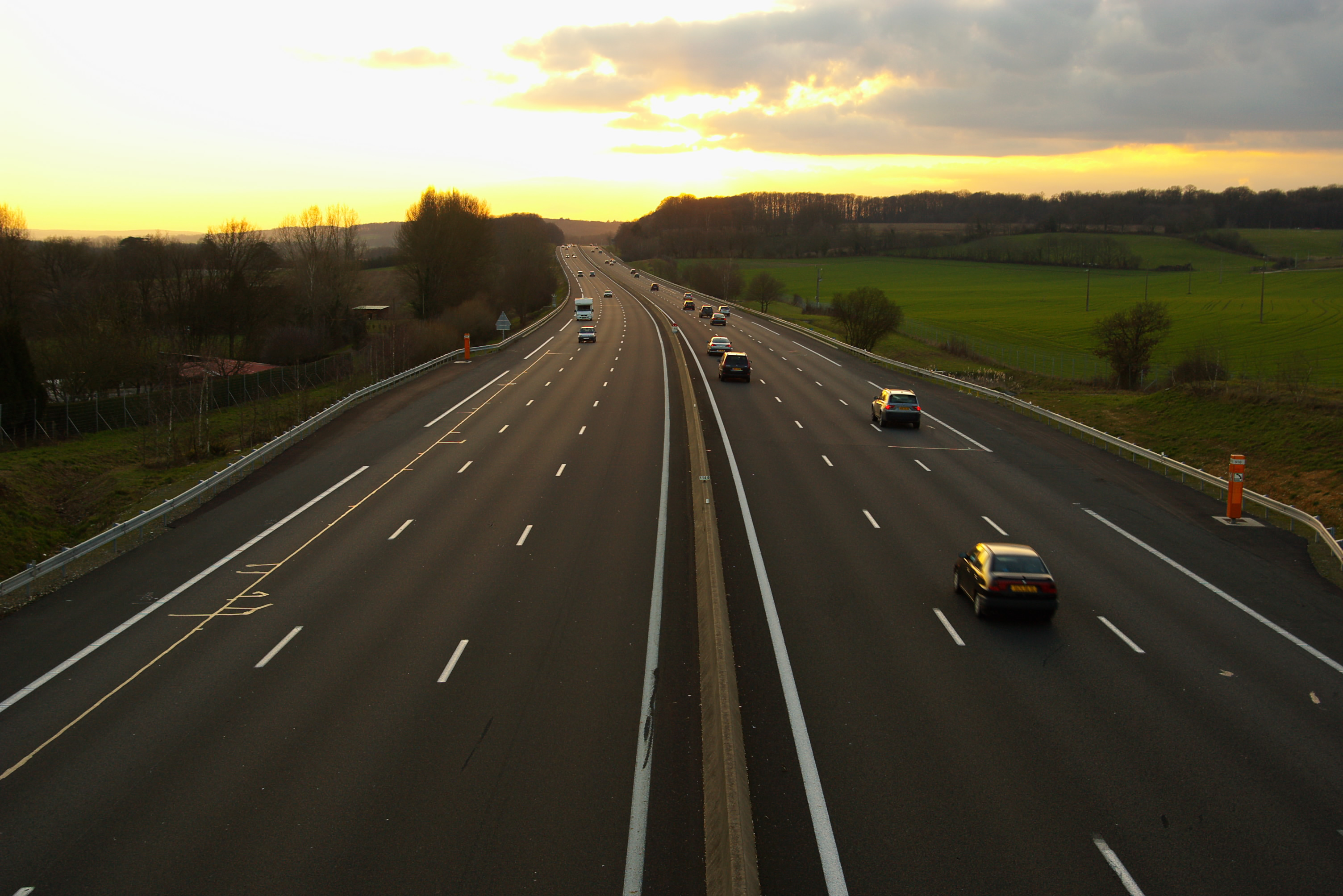 autouroute A11 prise direction Ouest entre Brou et le Mans à Authon-du-Perche. by --Clicgauche 07:49, 21 April 2008 (UTC)